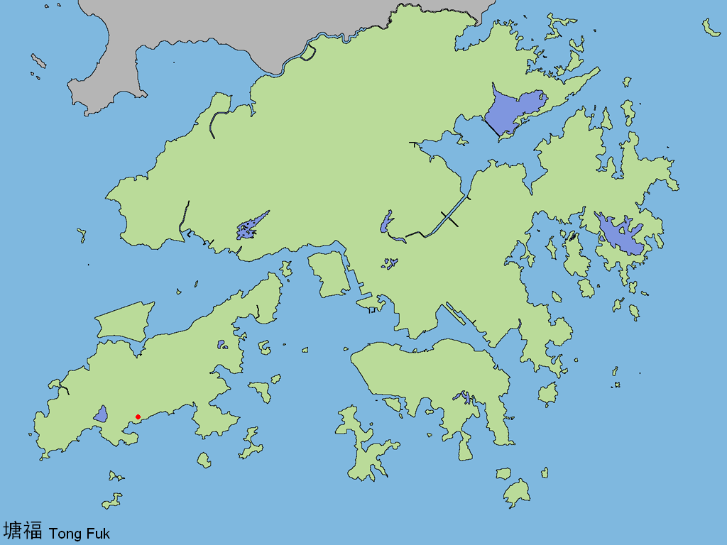 中文（香港）: 塘福。